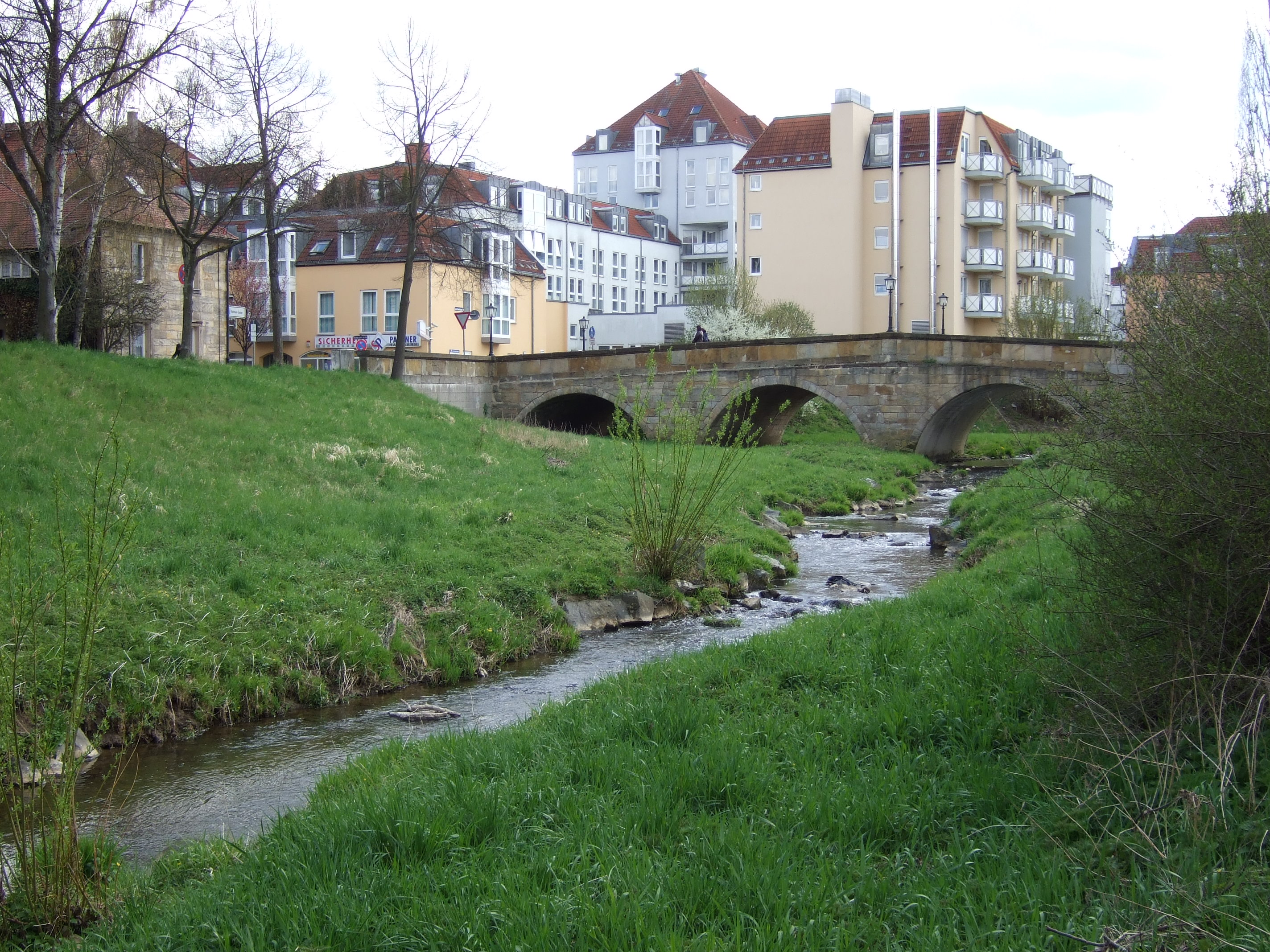 Der Mistel in Bayreuth (Brücke Kulmbacherstrasse).